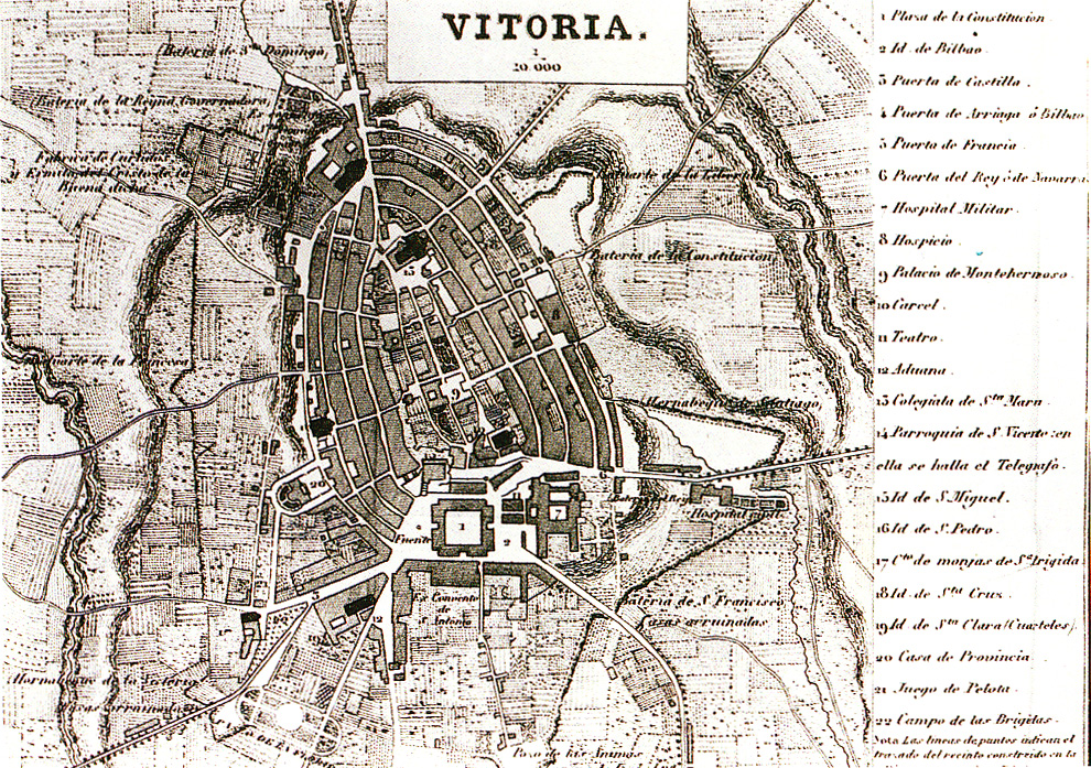 Gasteizko planoa, 1843.